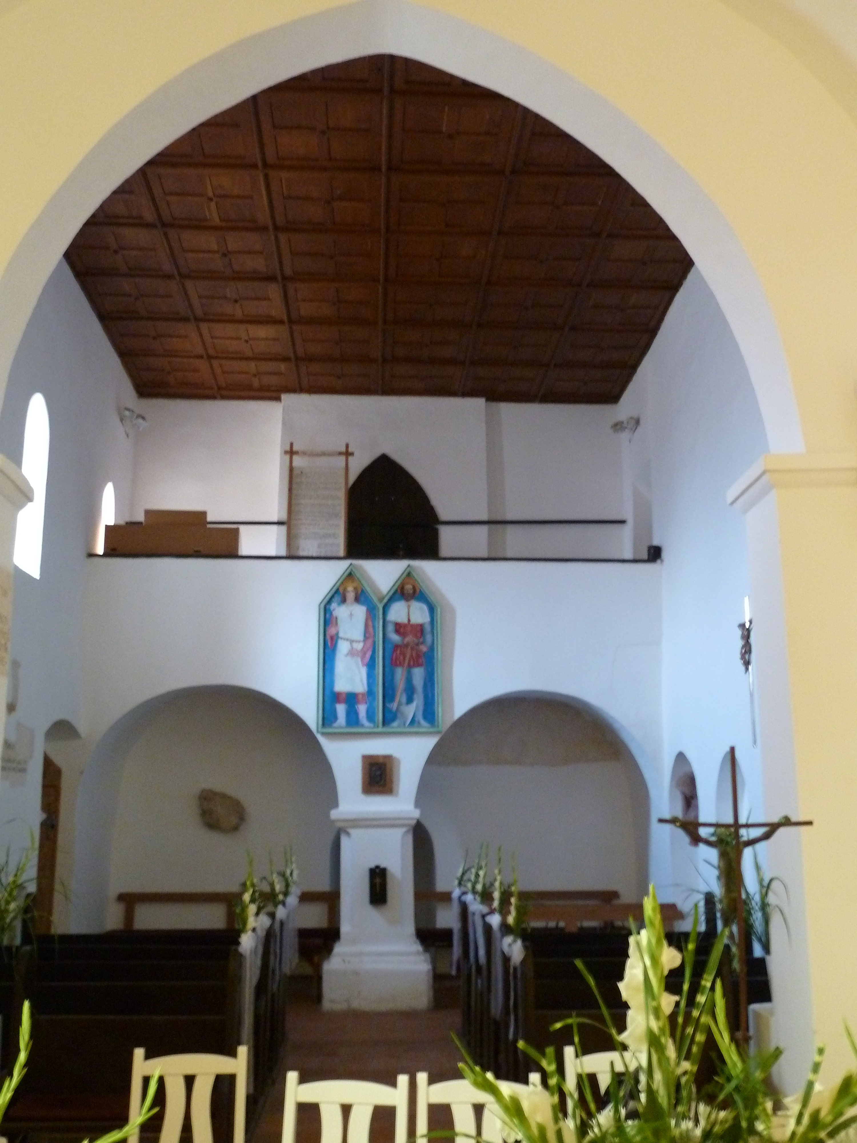 A Szent Péter-templom karzata, Őriszentpéter